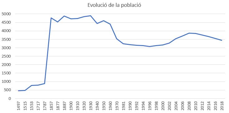 Ev